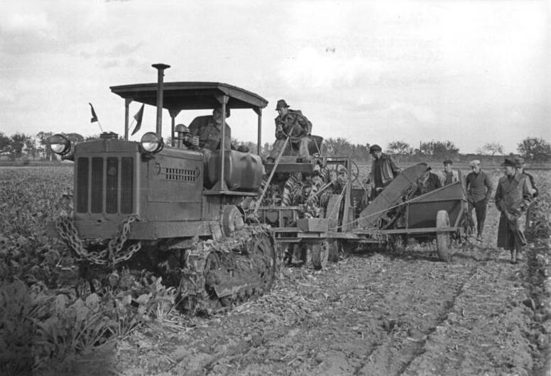 Zentralbild-Illner, 14.10.10952 Die Sowjetunion hilft unserer Landwirtschaft. Zu den Maschinen, die vor kurzer Zeit aus der Sowjetunion geliefert wurden, gehören auch Rüben-Aggregate. In Lehrgängen wurden die technischen Leite der Maschinen-Ausleih-Stationen mit der Handhabung und Bedienung dieser Maschinen vertraut gemacht, die jetzt in der Erntezeit unseren werktätigen Bauern eine wertvolle Hilfe sind und ihnen beweisen, dass ihre Arbeit im Sozialismus durch Vervollkommnung der Technik erleichtert wird. UBz. Ernte durch die MAS Leipzig-Knauthain mit dem neuen sowjetischen Rüben-Aggregat.